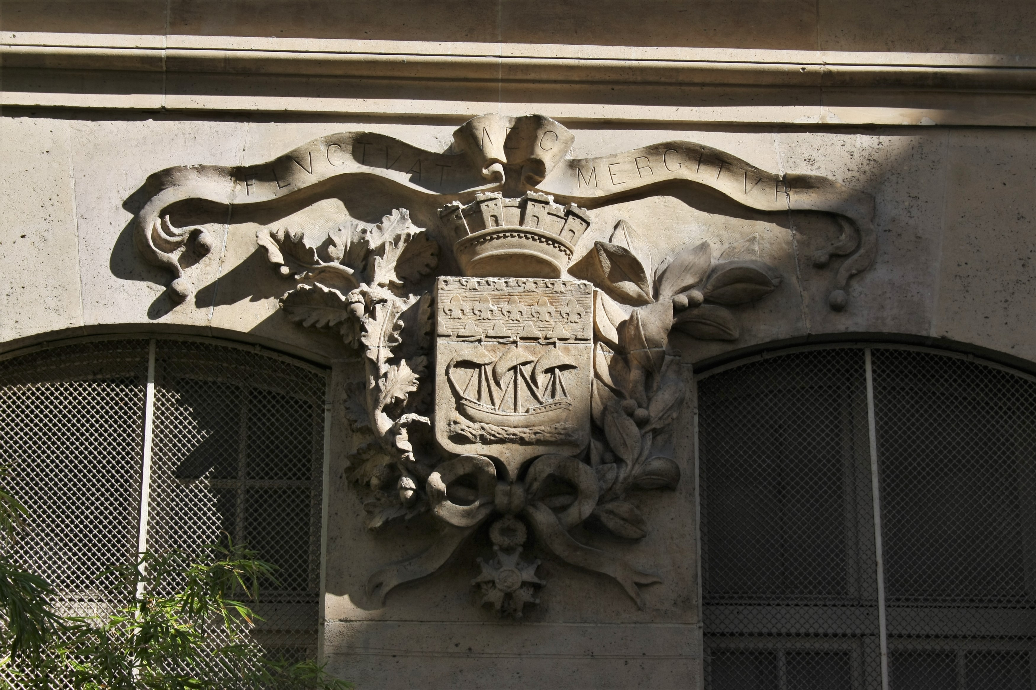 Schule in der Rue des Vertus im 3. Arrondissement in Paris (Île-de-France/Frankreich)